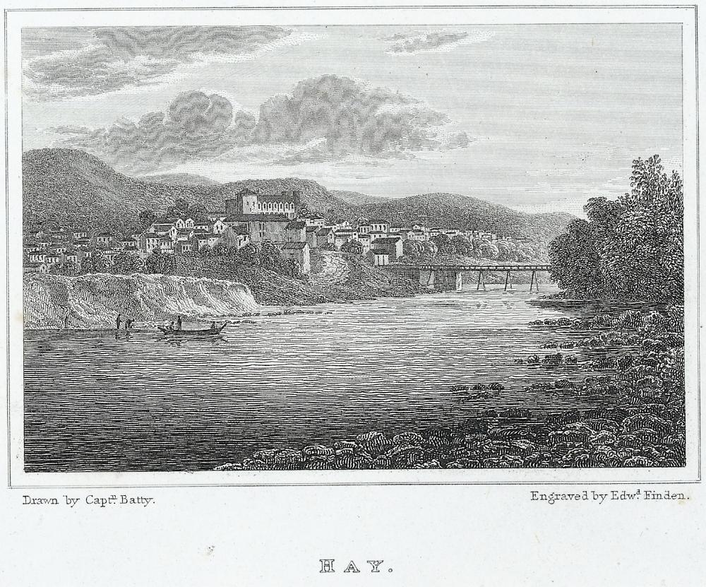 Hay